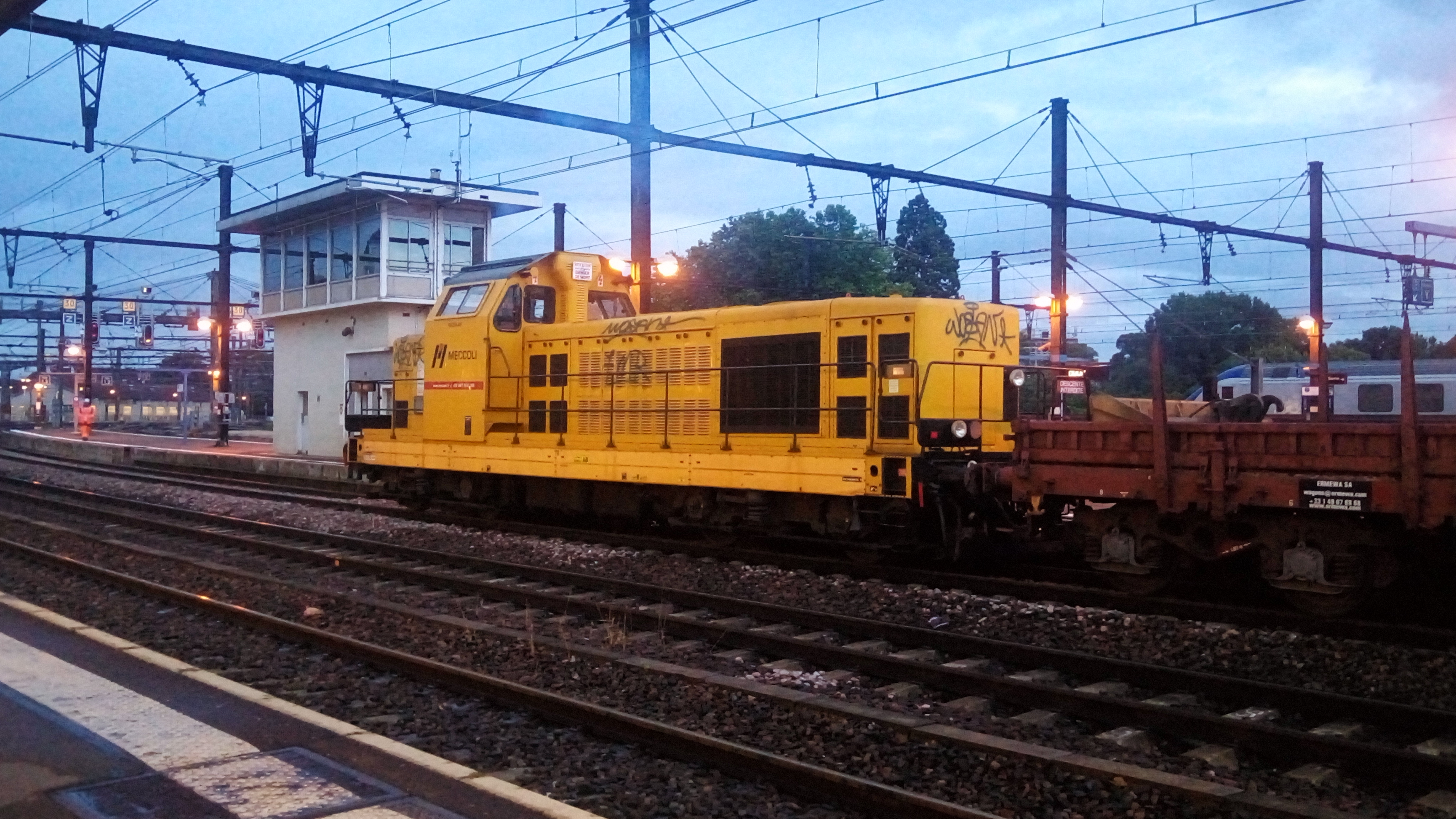 Chantier en gare de Dijon-Ville, mené par l'entreprise Meccoli en 2018 avec une BB 66000, anciennement SNCF